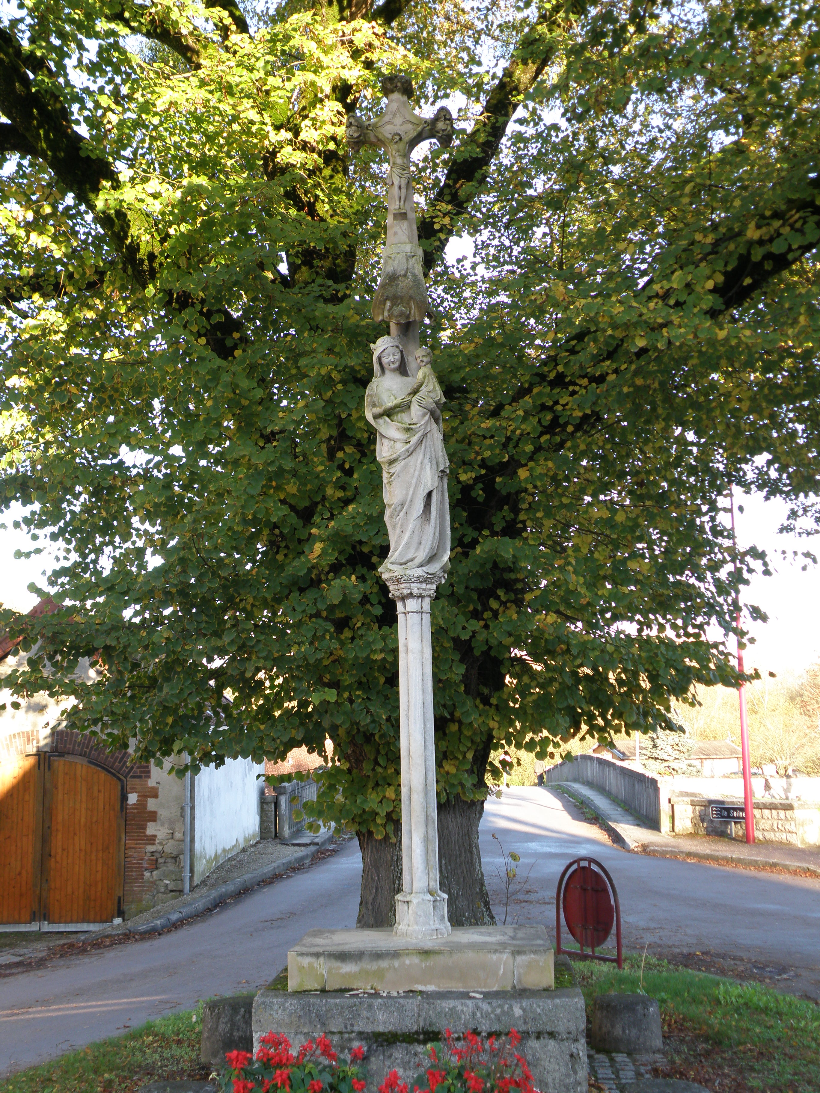 Croix de carrefour. 10260 Fouchères